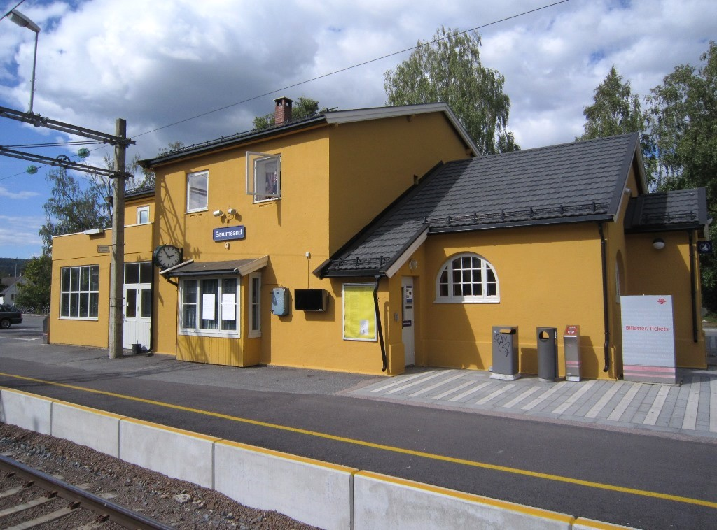 Sørumsand stasjon på Kongsvingerbanen anno 2013